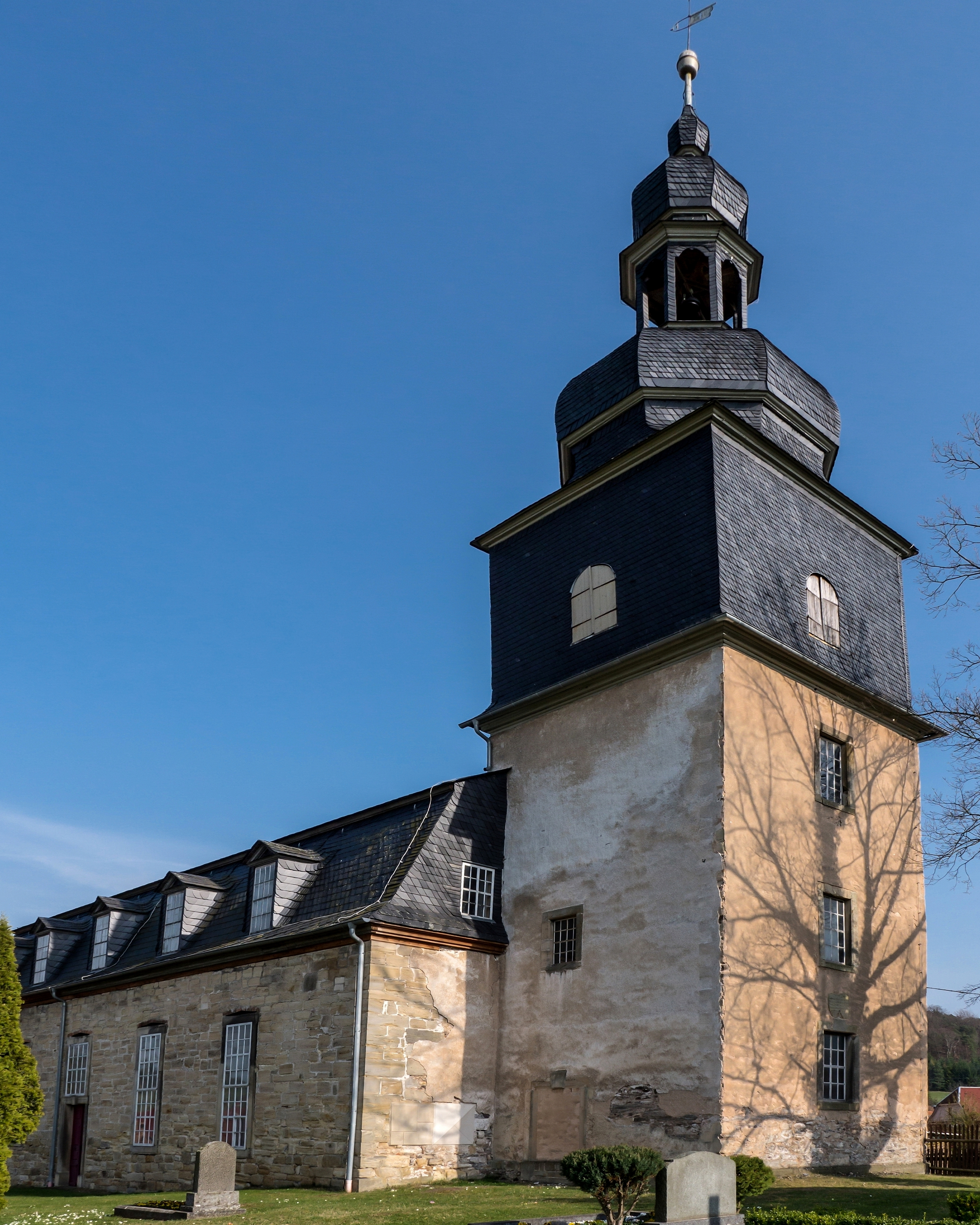 Nordwest Ansicht